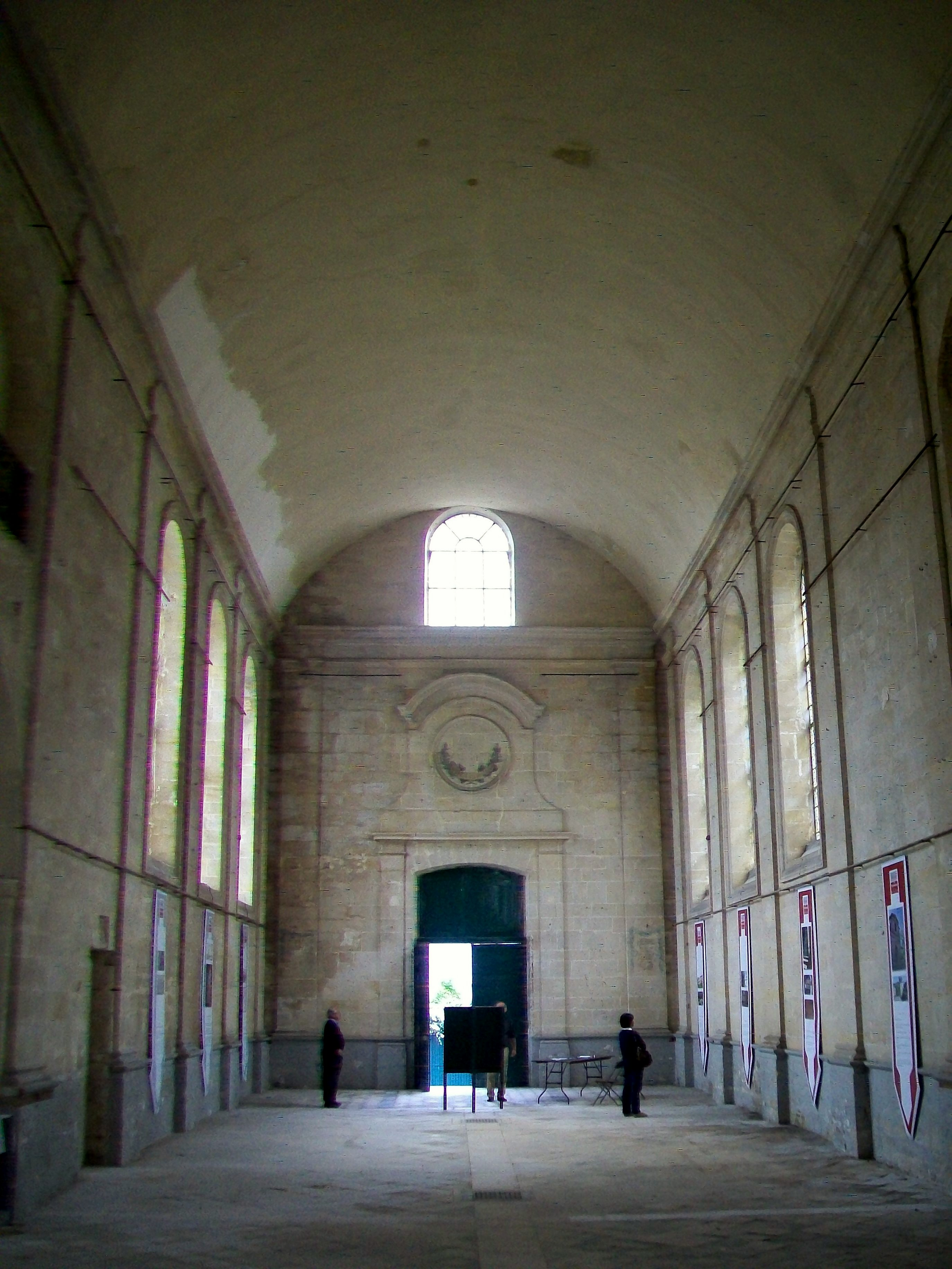 La nef de la chapelle, vue sur le portail au nord.